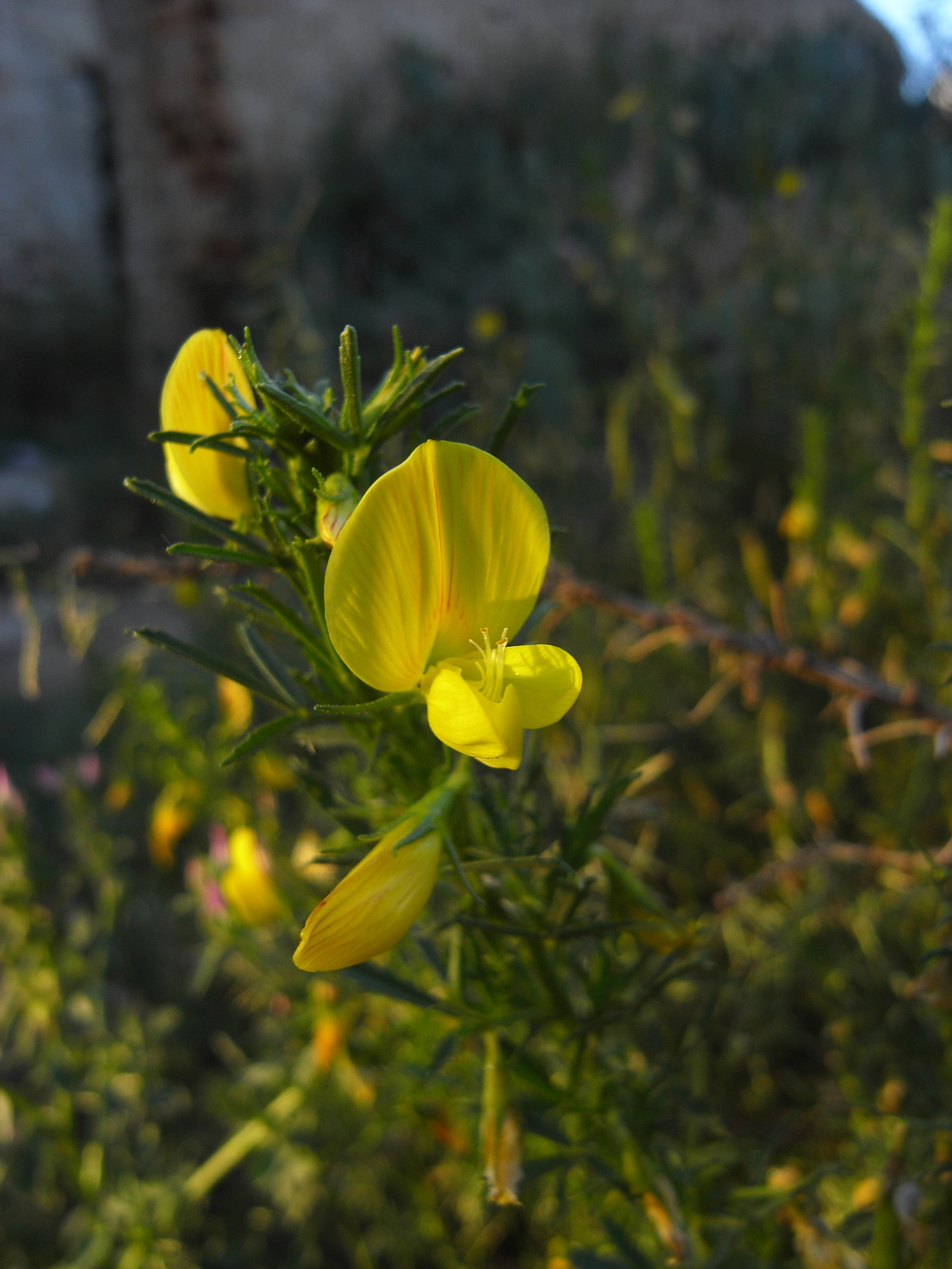 Ononis angustissima, Sousse, Tunesien, Ende April 2009